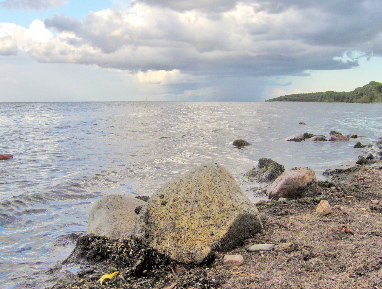 Zatoka Pucka widok na południe od Pucka w kierunku południowym, lipiec 2006 Bay of Puck (south of Puck, southwards), Baltic Sea, Poland, summer, 2006 Autor: Krzysztof